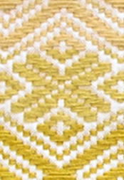 Detalj med en mönsterrapport upphämta. Detalj från denna bild